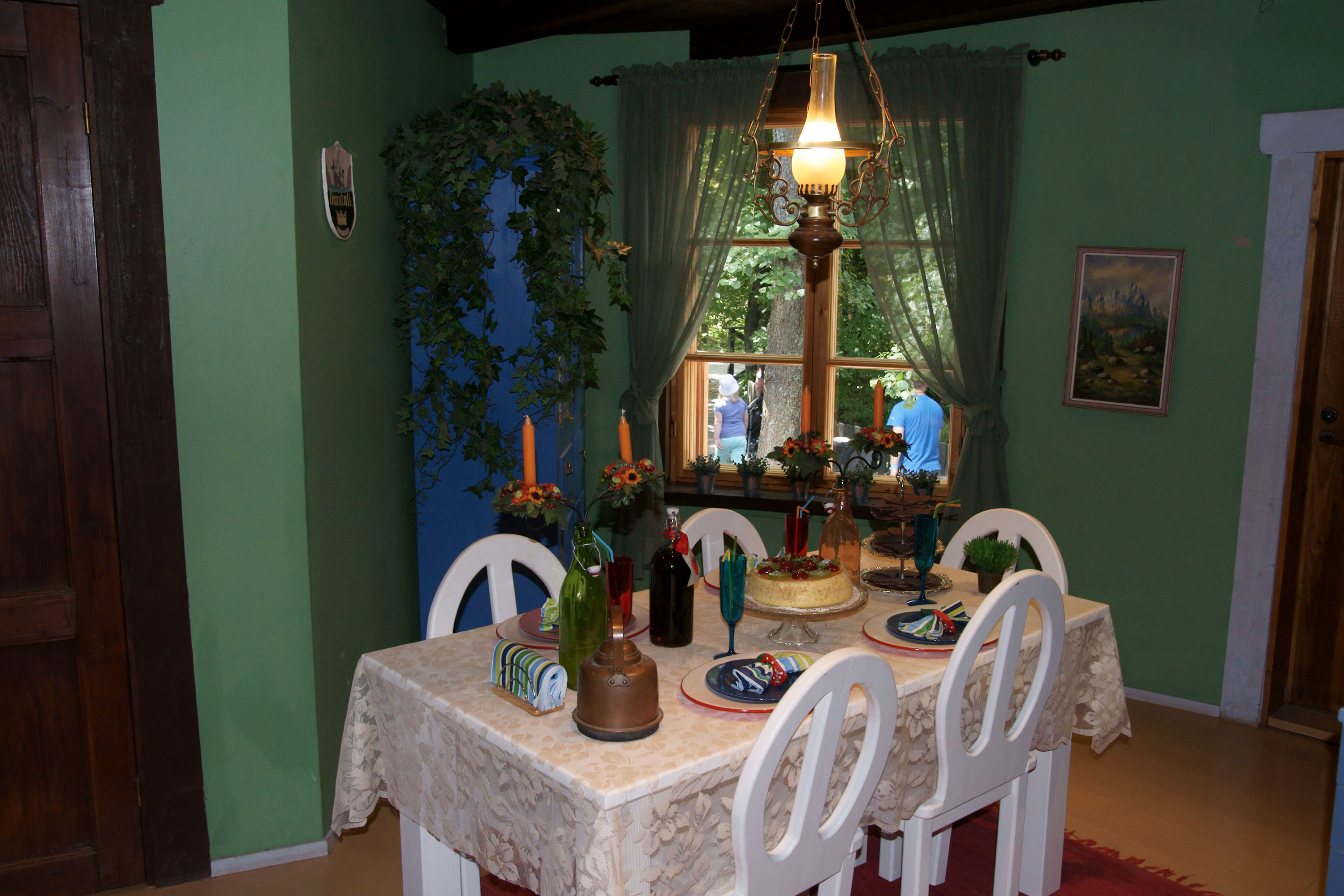 Muumitalon ruokahuone Muumimaailmassa, Naantalissa.